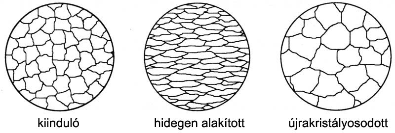 Az alakváltozás és az újrakristályosítás hatása a szemcseszerkezetre